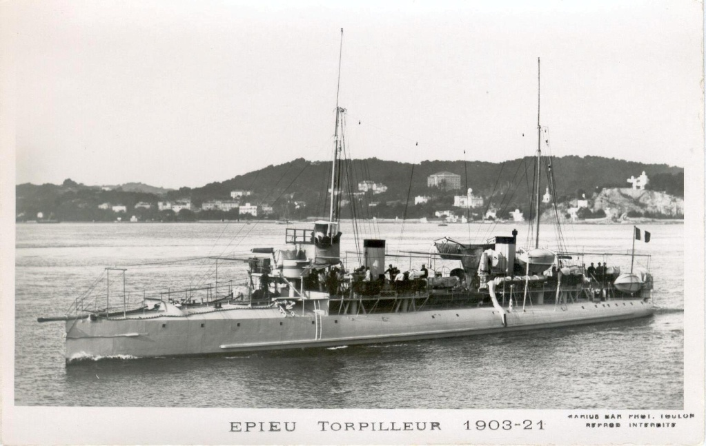 Contre-torpilleur français : Epieu